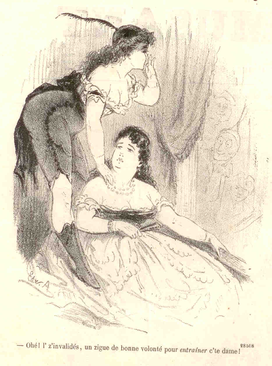 Dessin d'Edward Ancourt illustrant les bals masqués du Carnaval de Paris, extrait du Journal Amusant, numéro 737, 12 février 1870.